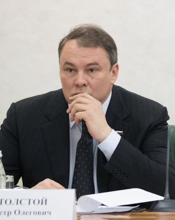 Толстой Пётр Олегович — российский государственный и общественный деятель, журналист